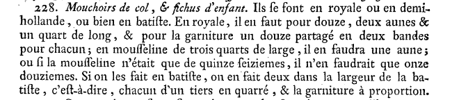 Article "mouchoir de col" des "Descriptions des arts et métiers, faites ou approuvées par Messieurs de l'Académie royale des sciences de Paris", auteur : Académie royale des Sciences, 1771-1783.